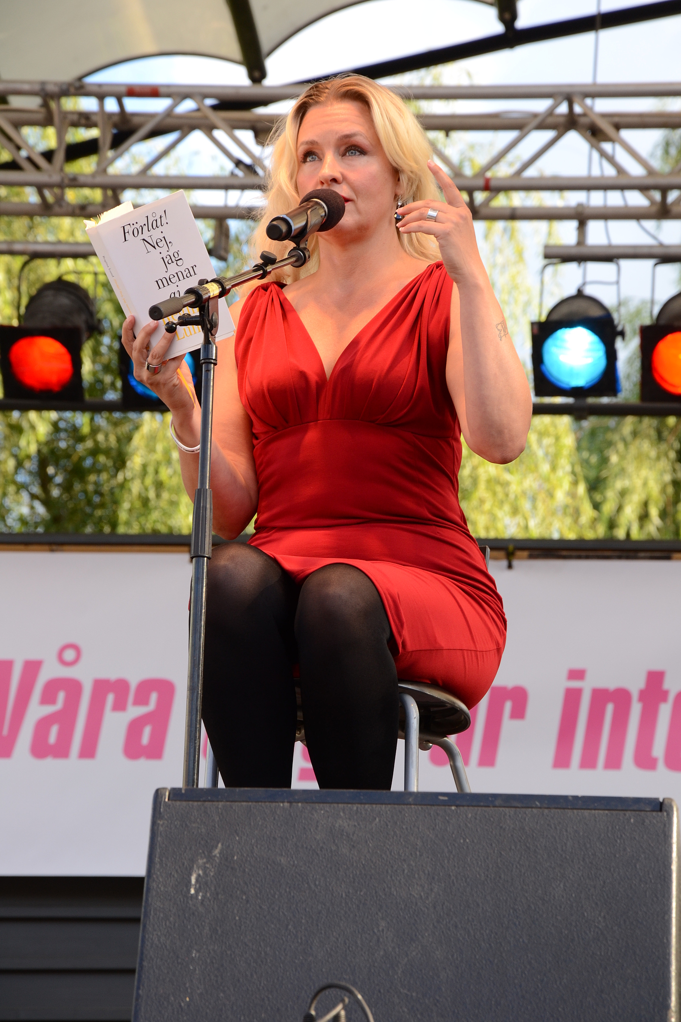 Från Barnrättsgalan 2011-08-23 i Kungsträdgården